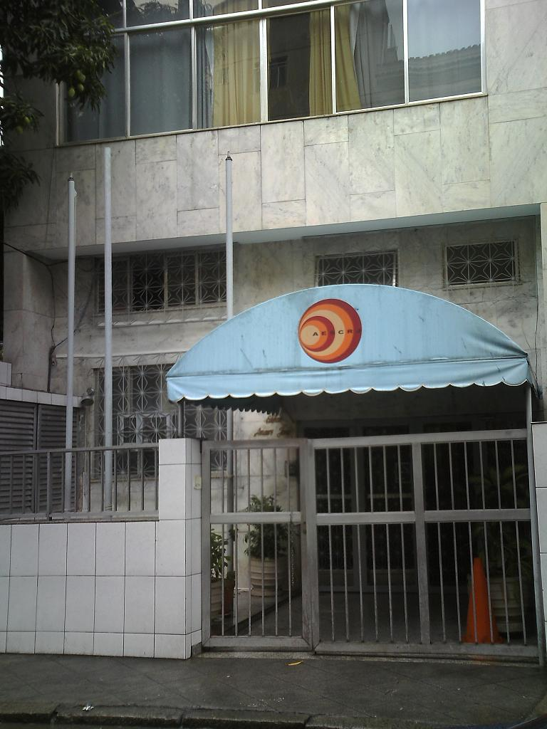 sede da AESCRJ.